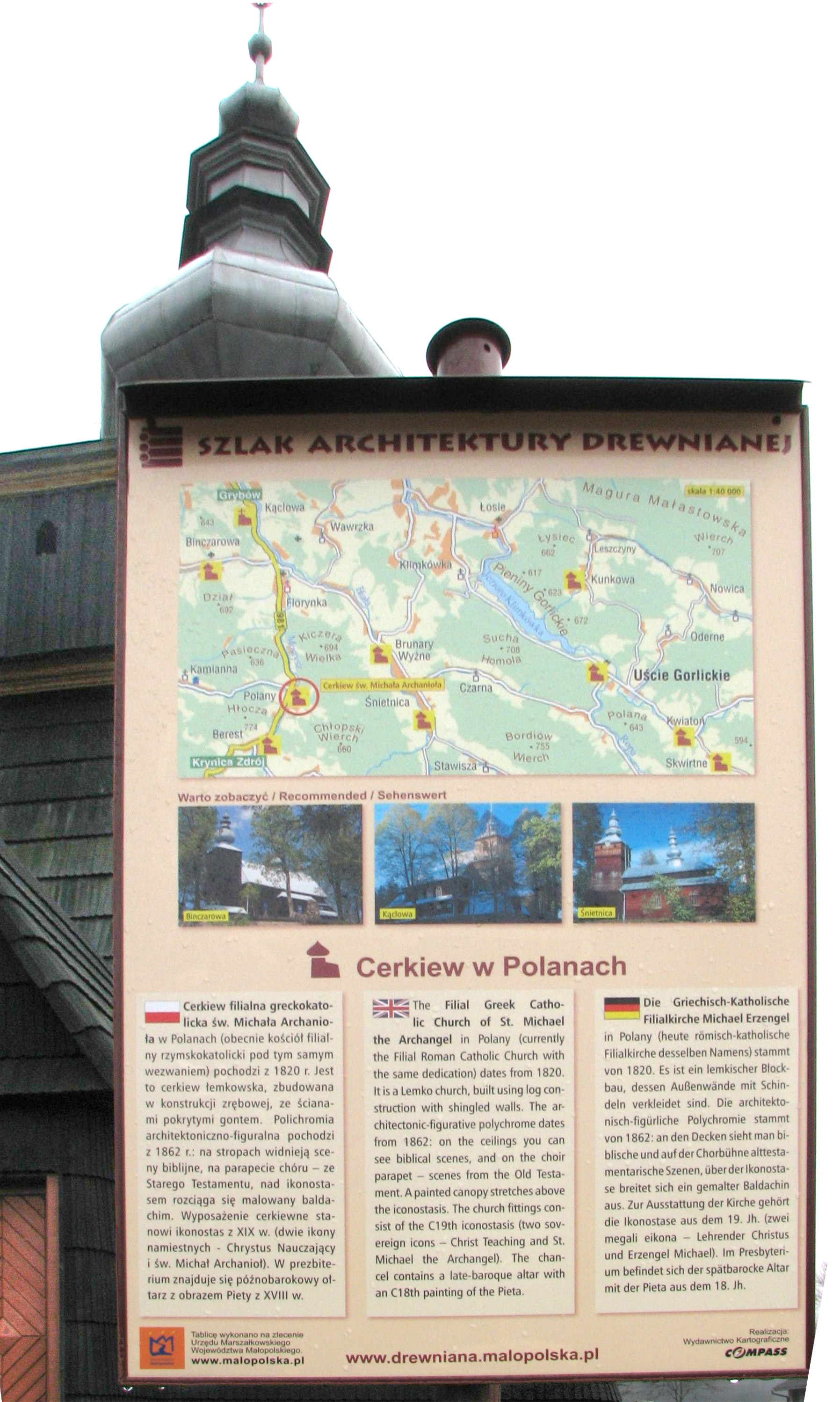 Cerkiew greckokatolicka św. Michała Archanioła (obecnie kościół filialny rzymskokatolicki pod tym samym wezwaniem) we wsi Polany. Tablica informacyjna.